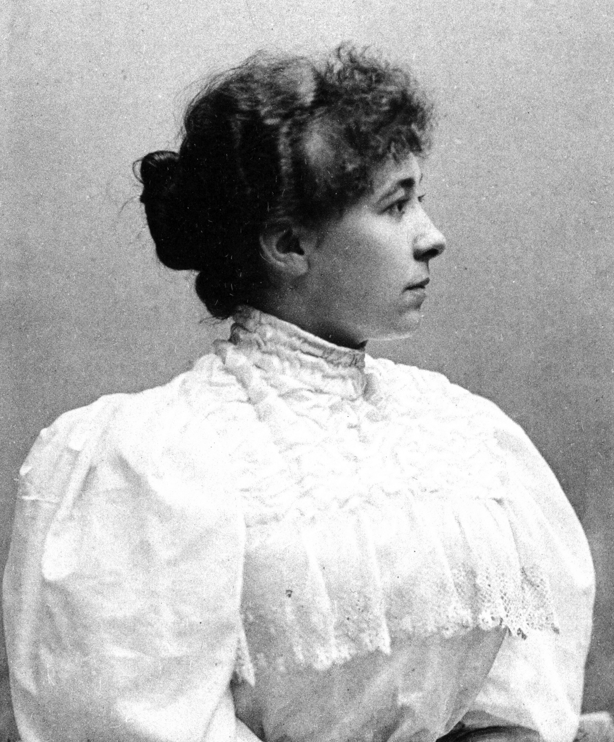 Dagmar Sterky (1866-1956)